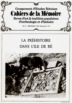 Les cahiers de la mémoire - revue d'art et tradition populaires d'archéologie et d'histoire de l'Île de Ré, publication de Jacques Boucard.